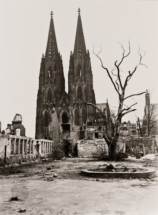 Blick durch die zerstörte Innenstadt zum Kölner Dom 1946. Erste Trümmer sind schon weggeräumt.